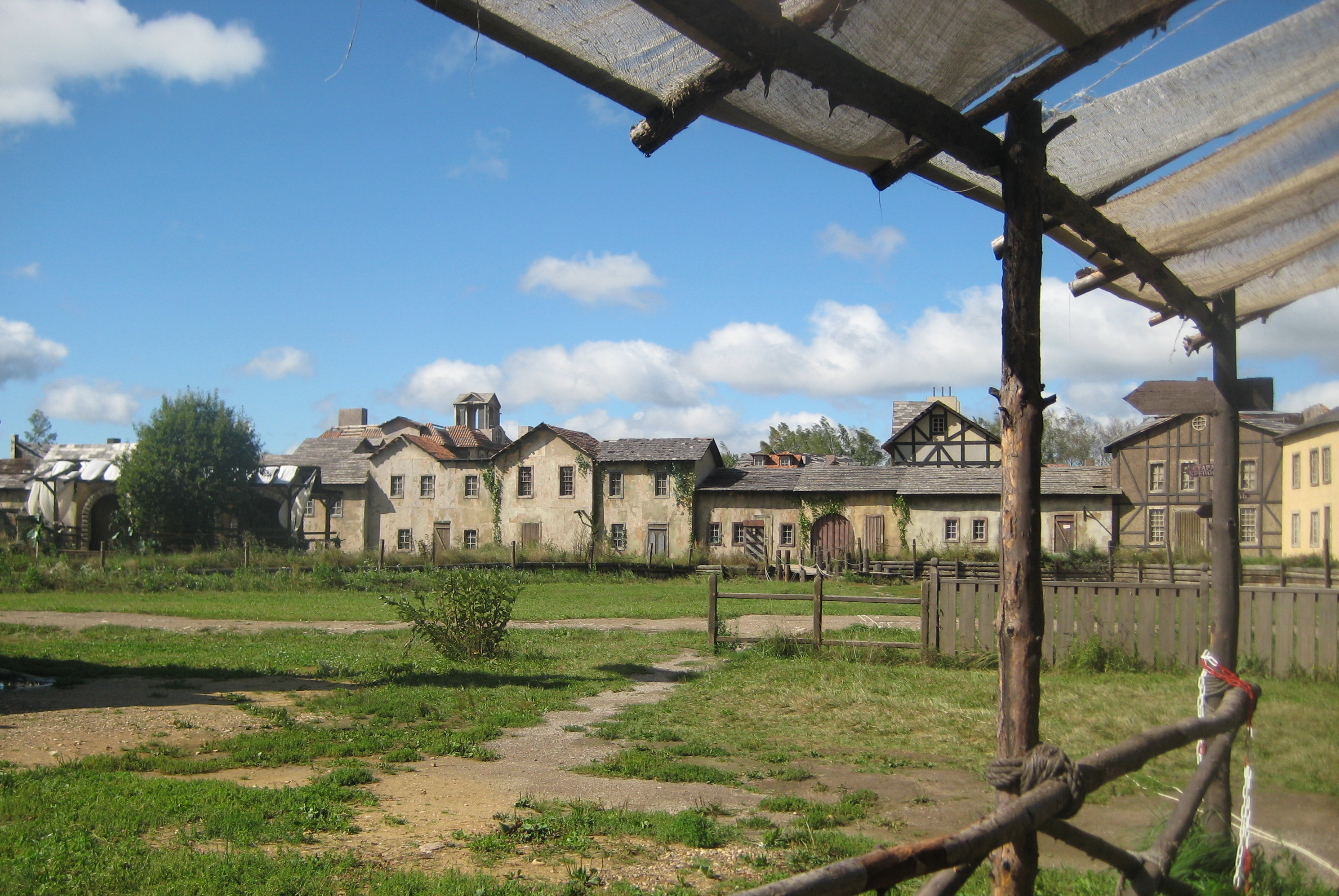 Киногород Piligrim Porto вблизи усадьбы Середниково.